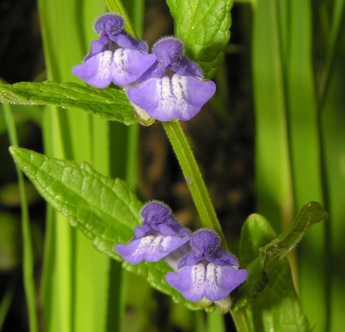 Pelkinė kalpokė (Scutellaria hastifolia) Šeima. Notreliniai (Lamiaceae) Foto: Algirdas, 2006 m. birželio 24 d., Lietuva